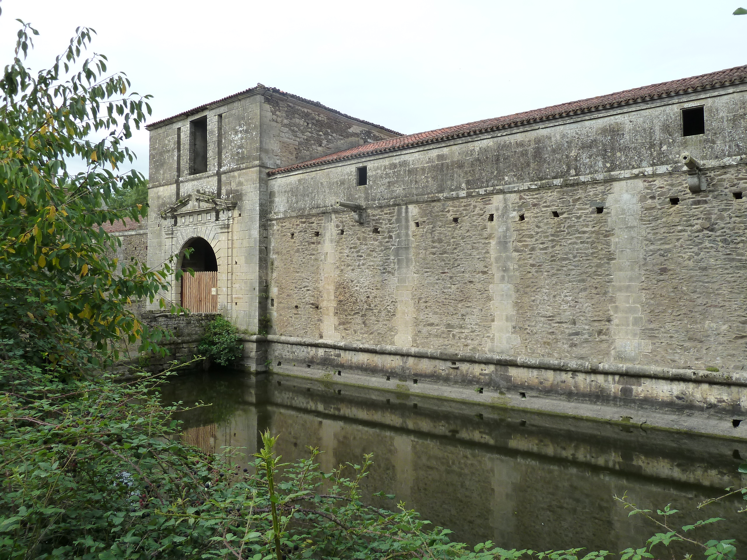 Château de la Citardière à Mervent, Vendée